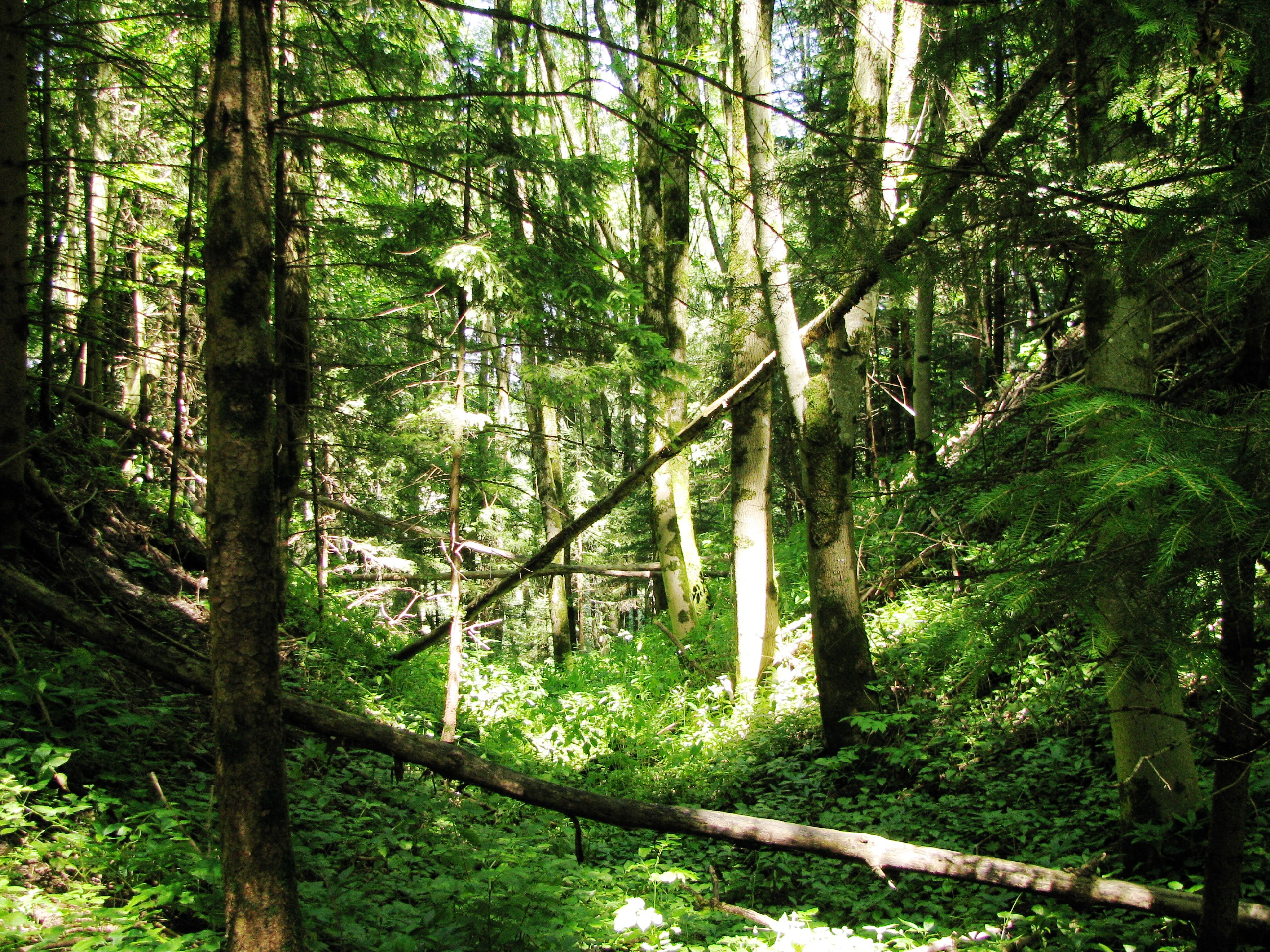 Burgstall Willenberg, Graben